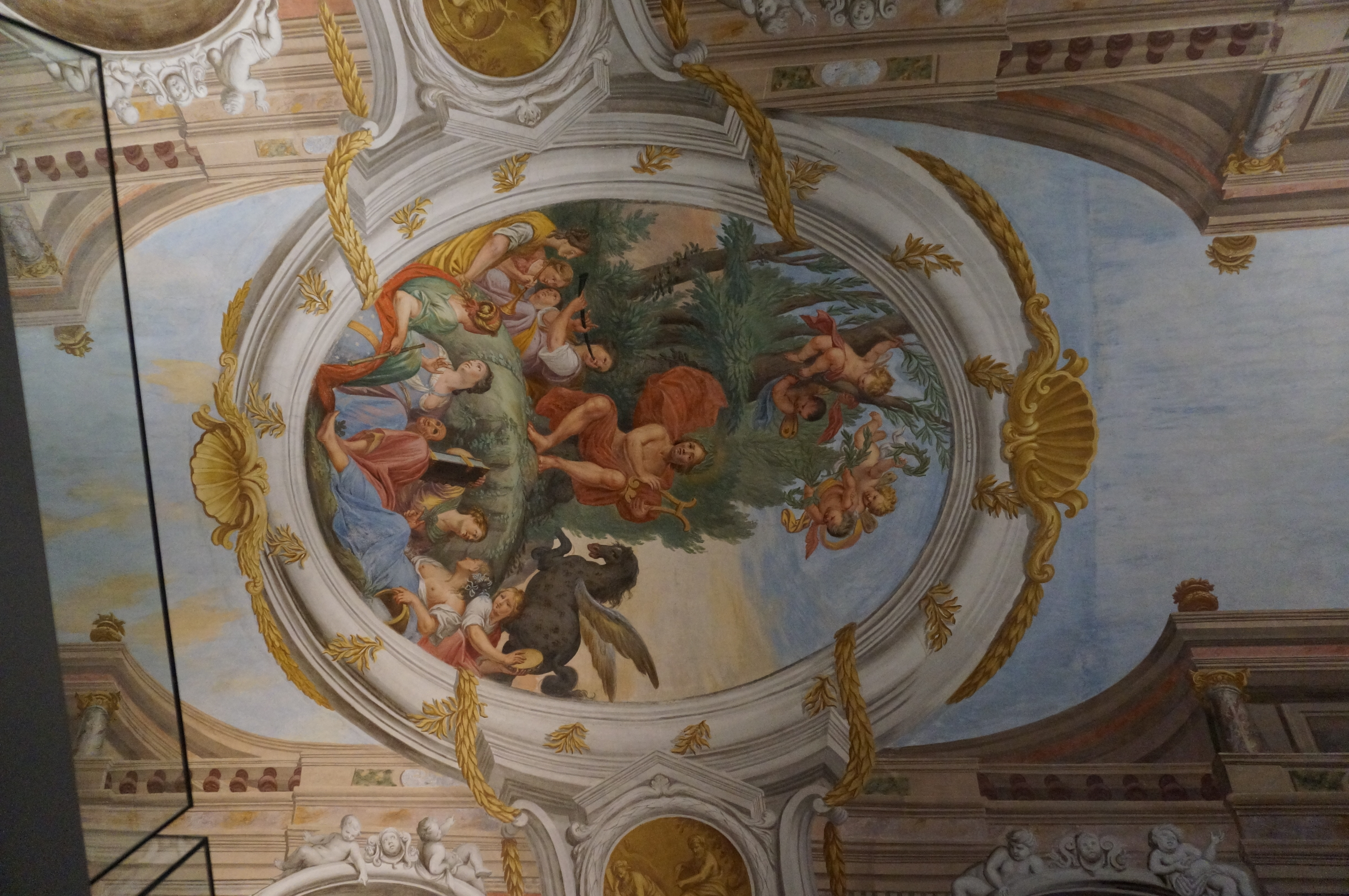 Lors de la visite du musée diocésain de Passau.